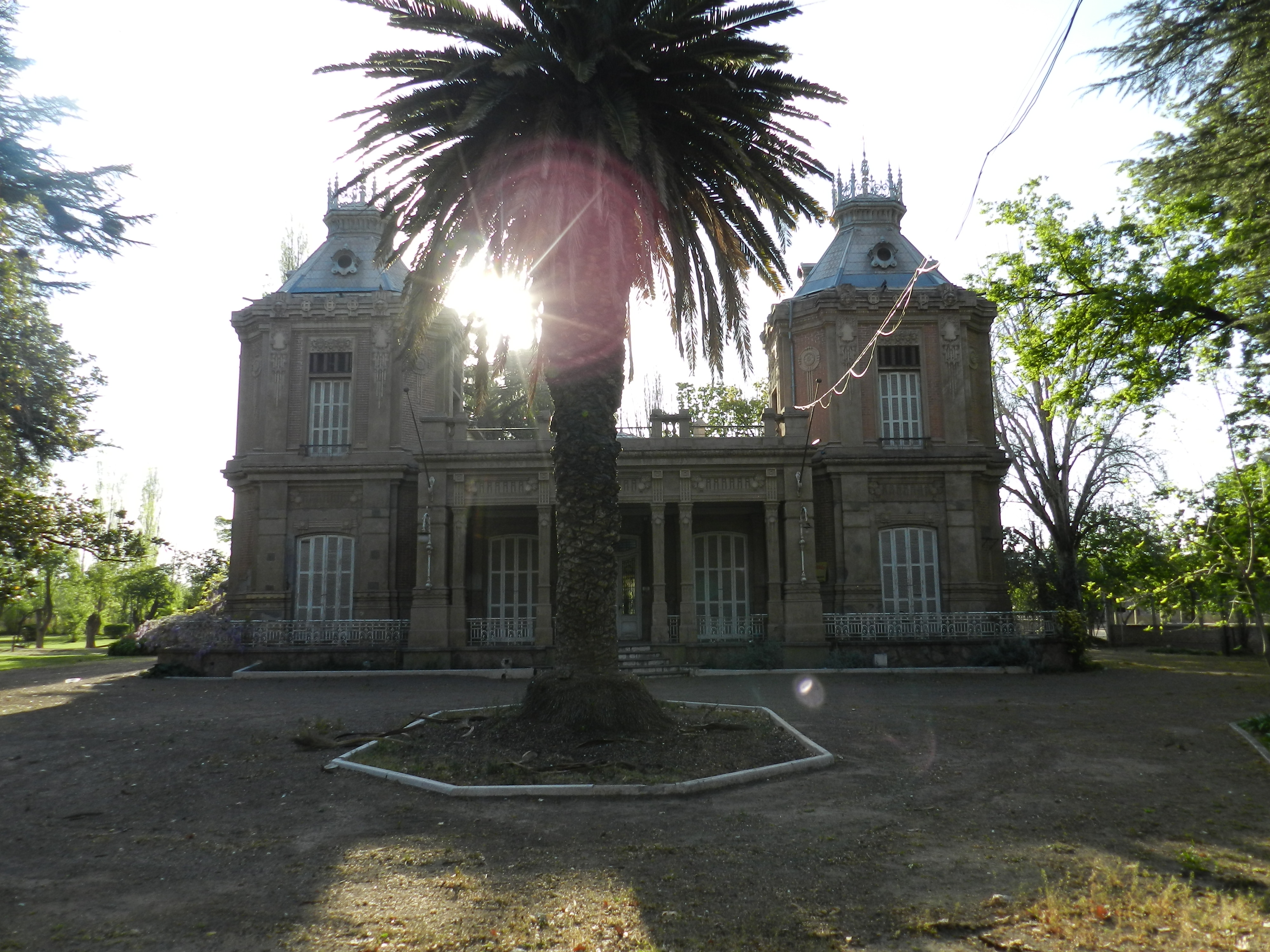 Casa de Juan Giol